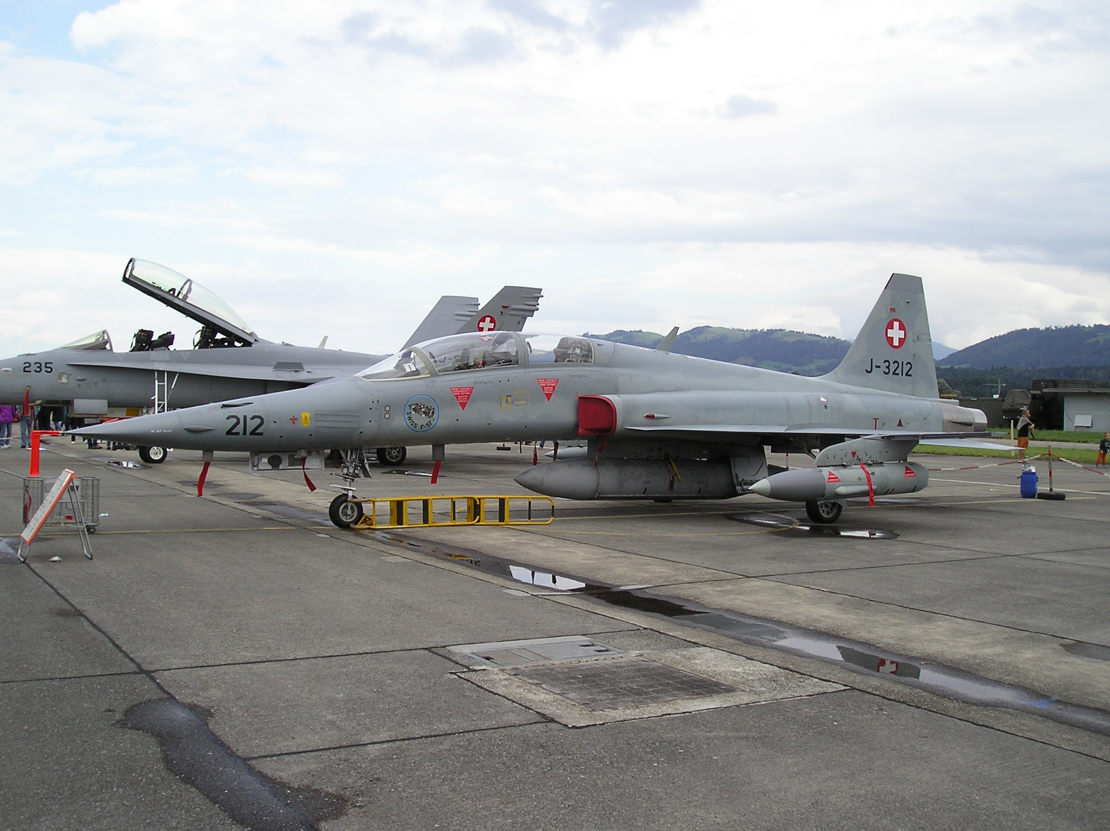 F-5F mit Ericson Vista5, Swiss Air Force Competition 2003 (SAFC) in Emmen